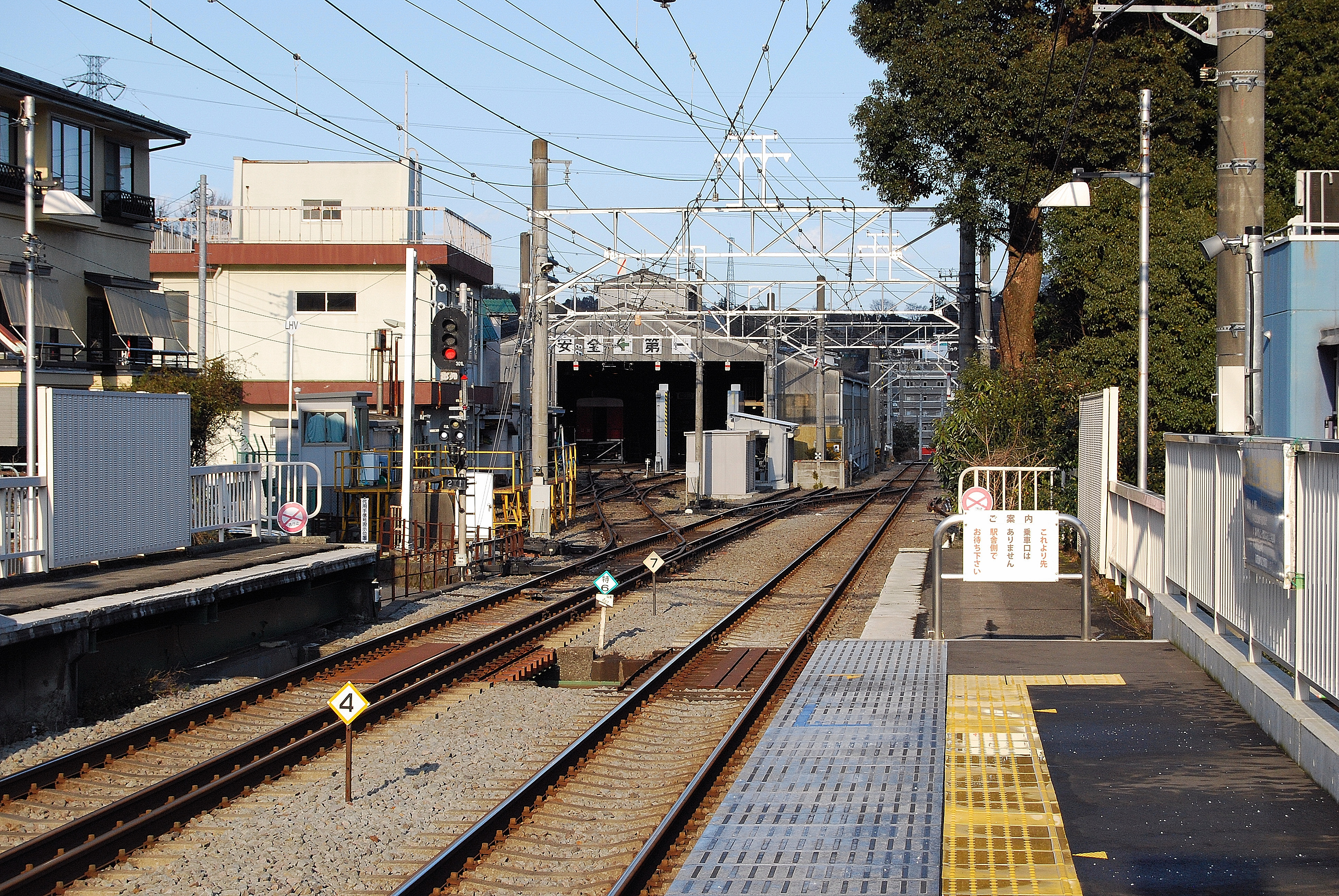 箱根登山鉄道、入生田駅の小田原方面を見る、２番線（左側）が三線軌条になっており三線軌条の箱根登山鉄道のレール（標準軌1435mm）が検車区（左奥）に線路が繋がっており箱根登山鉄道の車両が入庫して検修をうけられるようになっている。また小田急電鉄の車両が使用するレール（狭軌1067mm）は検車区に繋がっておらずそのまま直進して本線に繋がる。